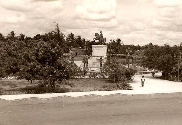 Plaza Bolivar El Tigre, Estado Anzoátegui - Venezuela (1960)